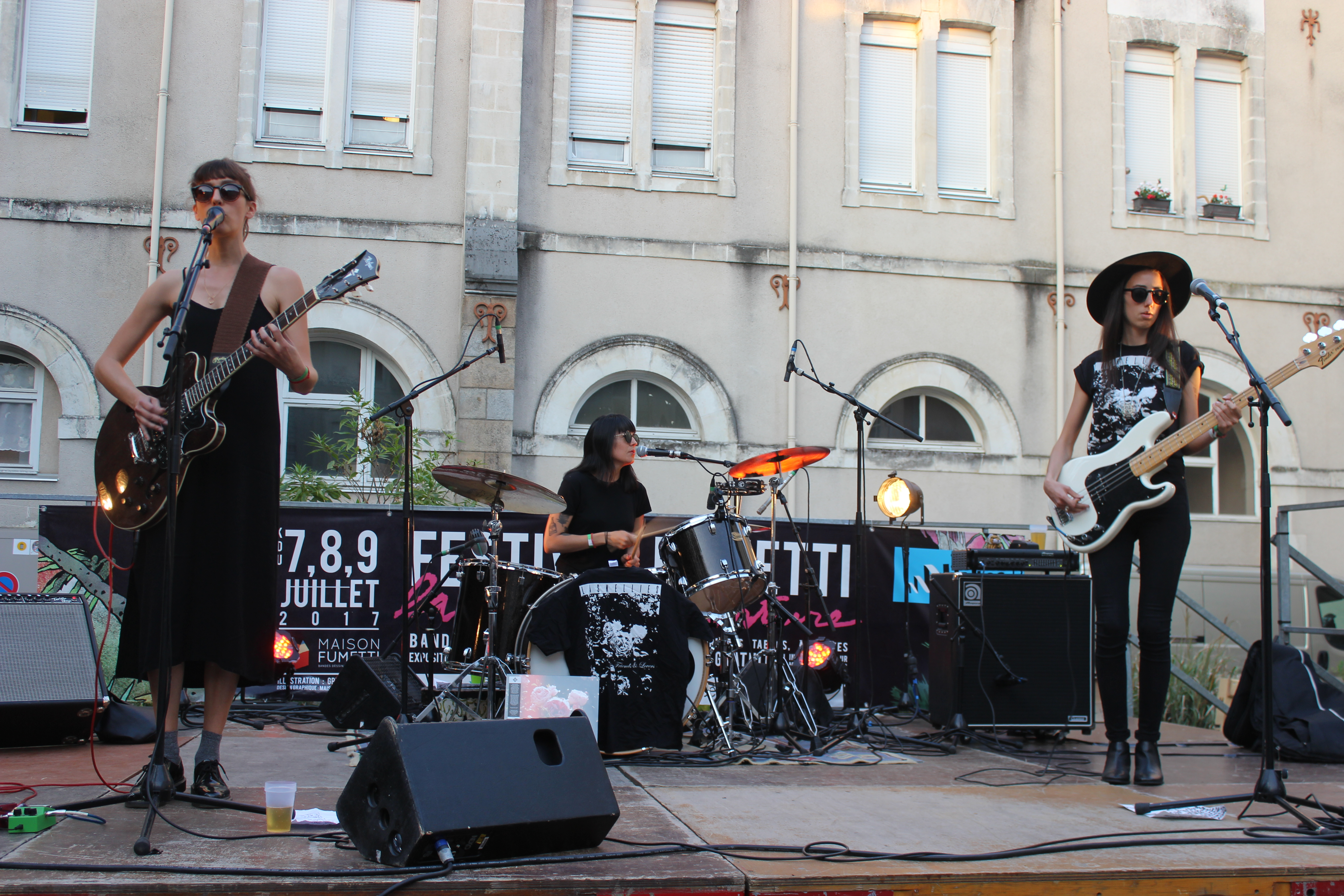 Le groupe de post-punk argentin Las Kellies, lors de la soirée de clôture du festival Fumetti à Nantes, le 8 juillet 2017.